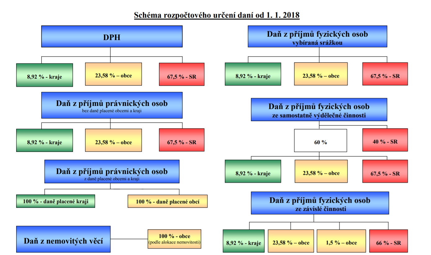 Rozpočtové určení daní České republiky platné od 1.1.2018